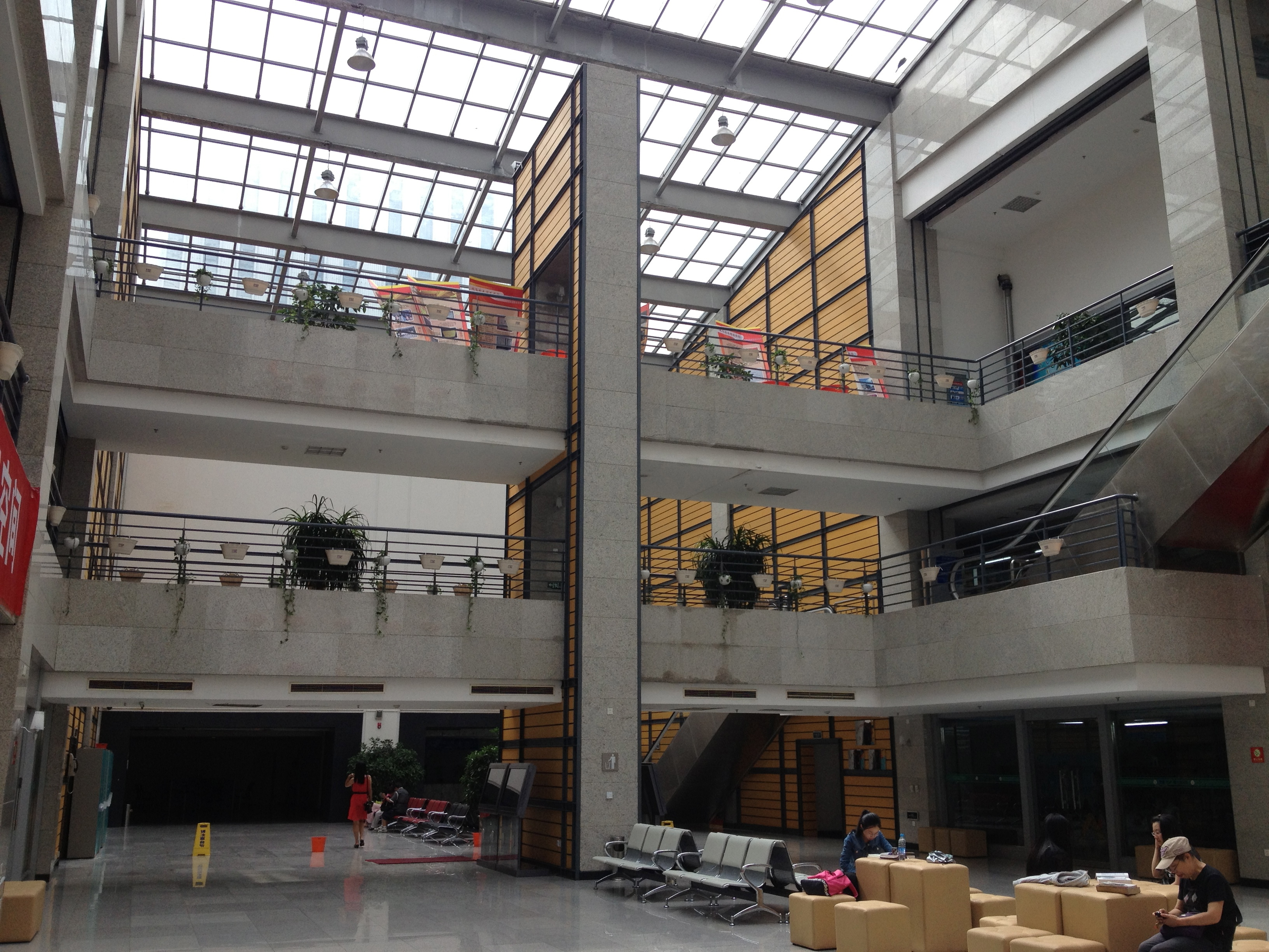 中文（中国大陆）: 沈阳市图书馆内景